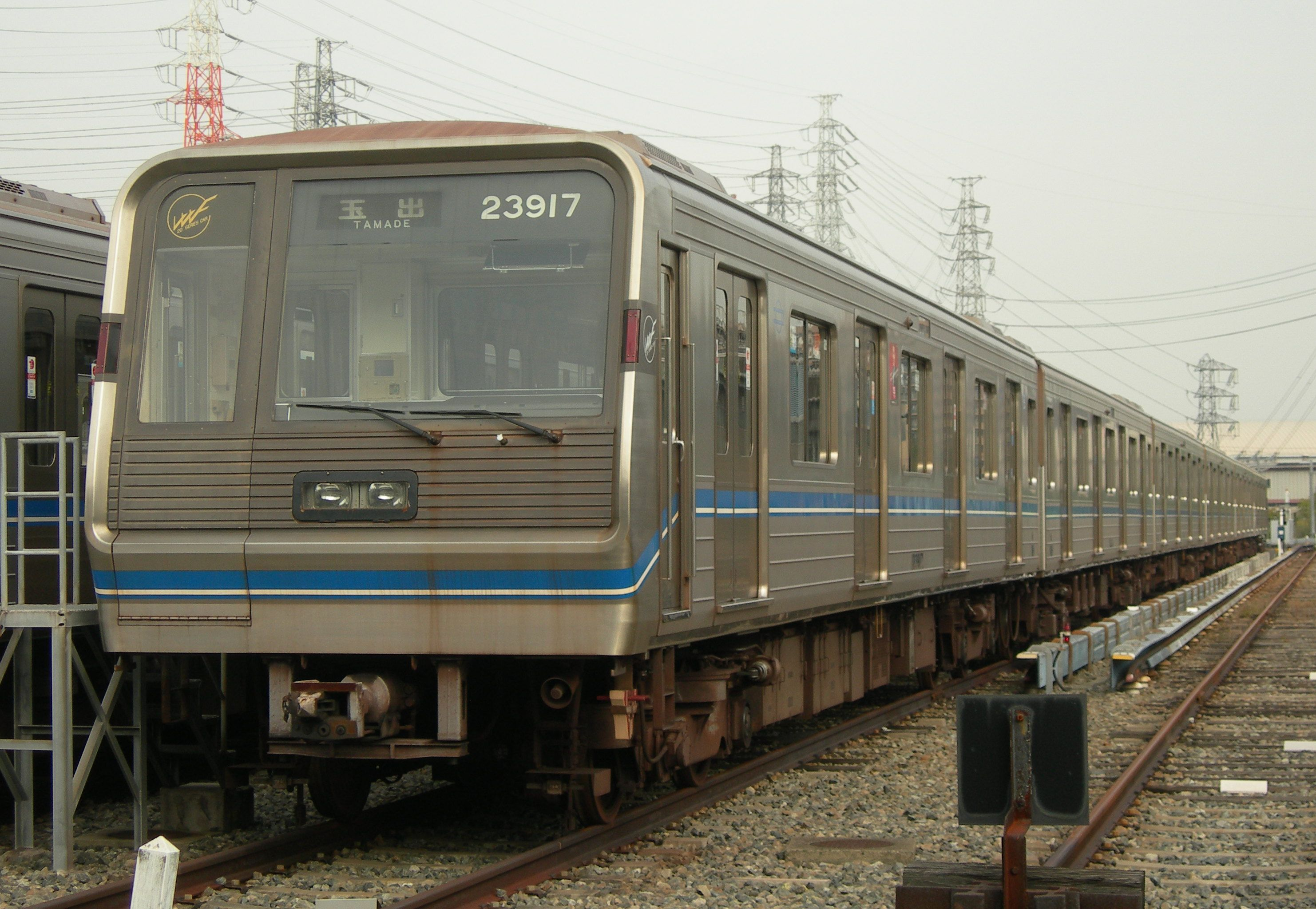 大阪市交通局20系電車・四つ橋線用23系